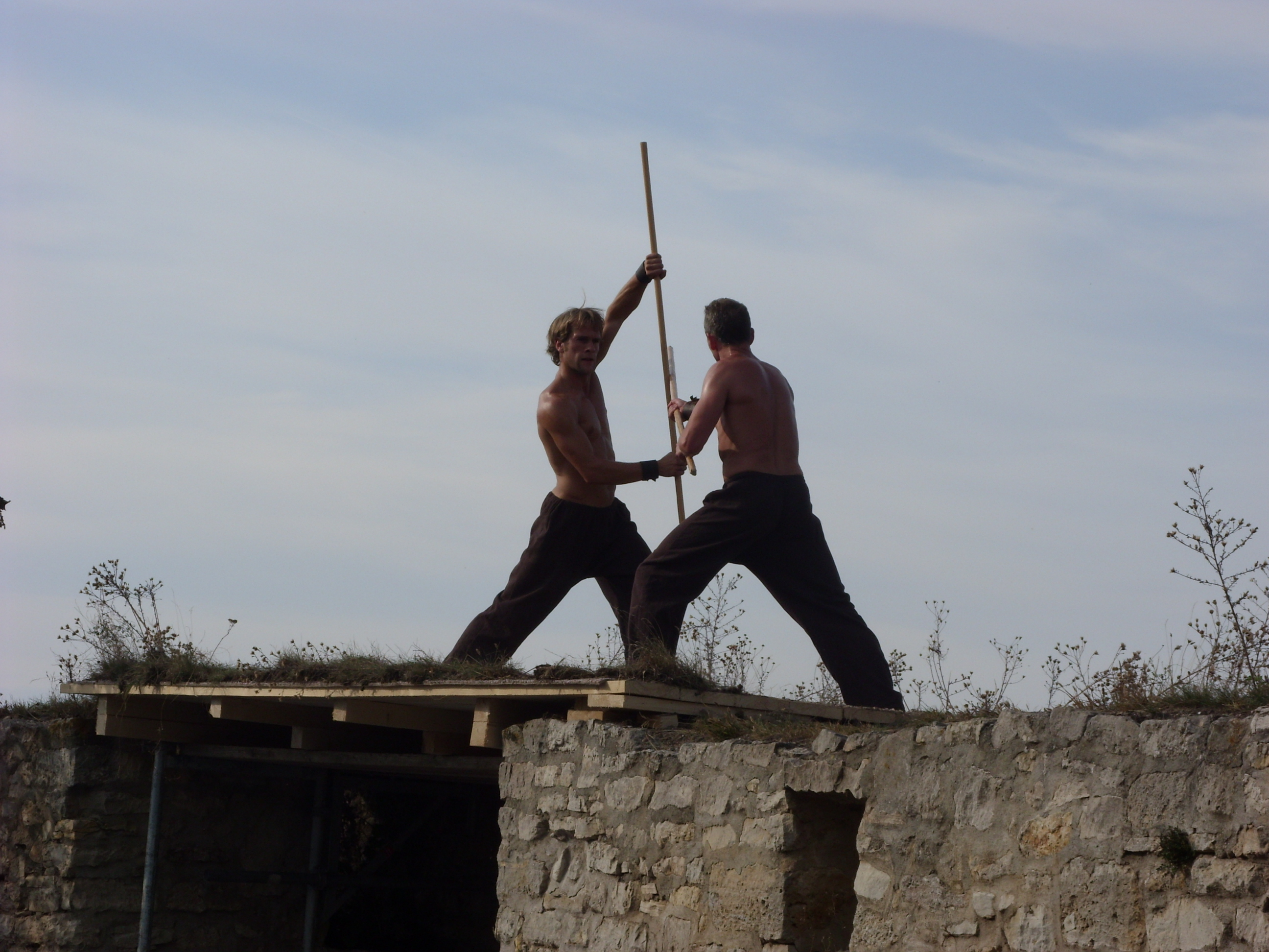 Lasko - Die Faust Gottes